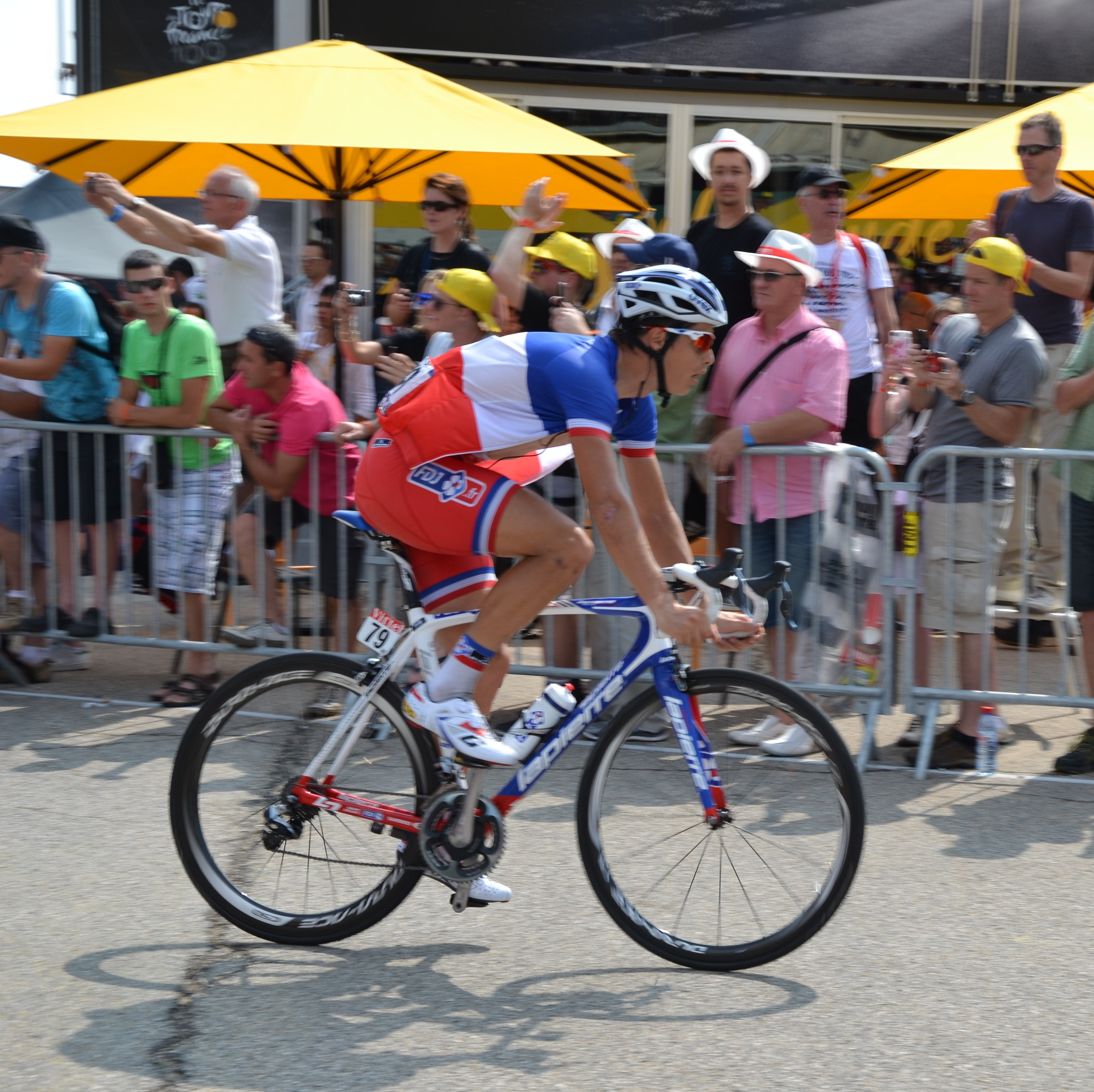 Au Chalet Reynard, lors de la 15ème étape du Tour de France 2013